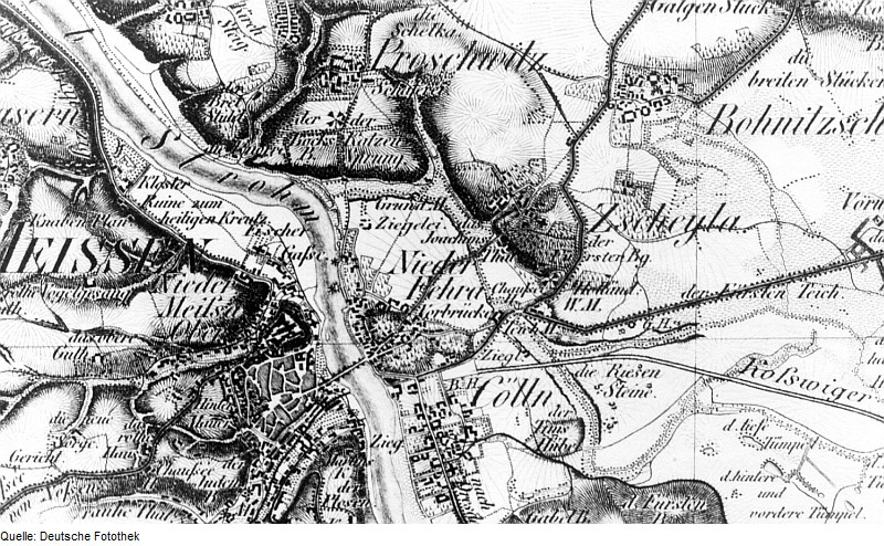 Original image description from the Deutsche Fotothek Meißen. Oberreit, Sect. Großenhain, 1841/43